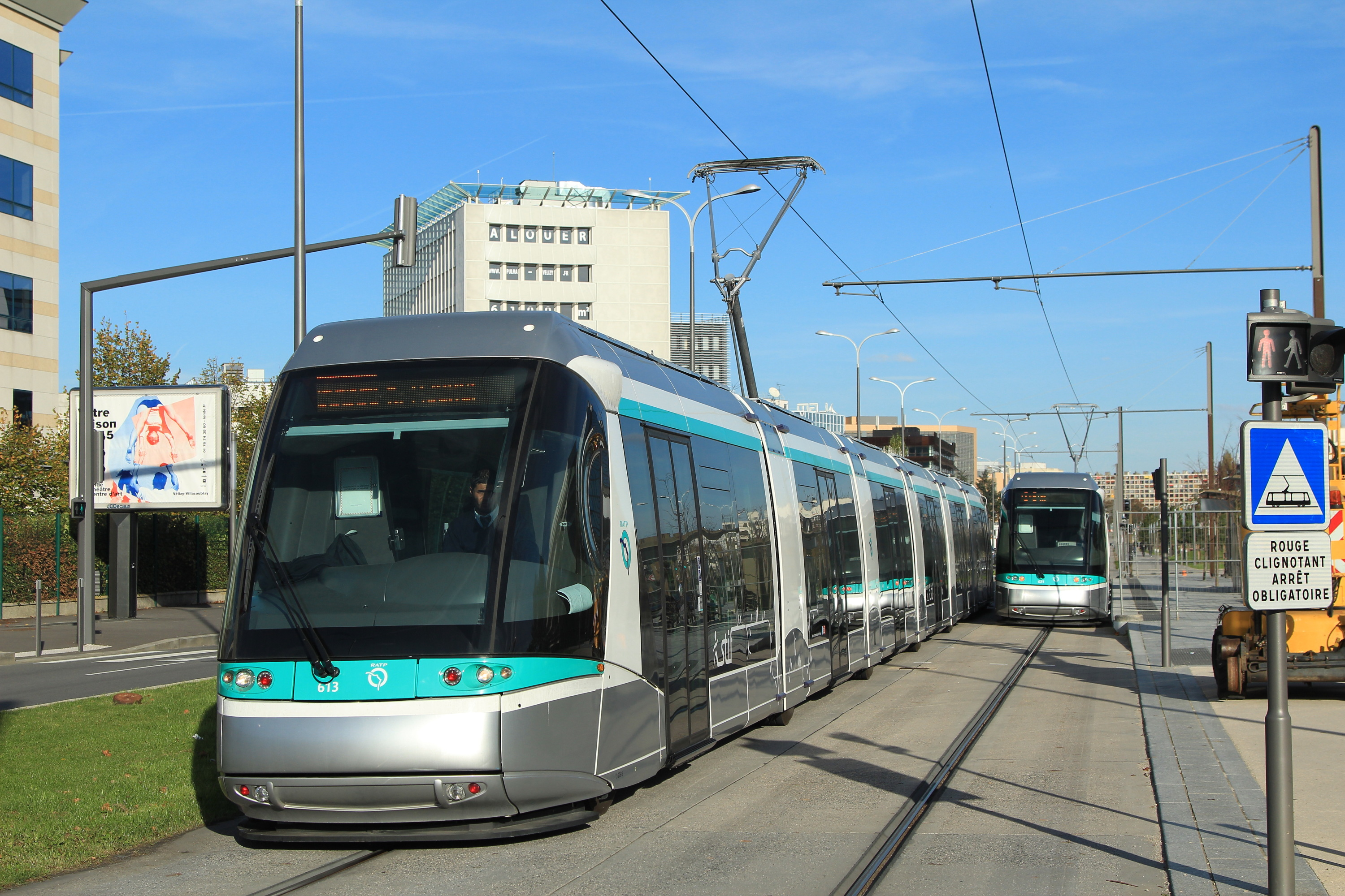 Les rames Translohr n°613 et n°621 à la station « Inovel Parc Nord » de la ligne 6 du tramway d'Île-de-France.